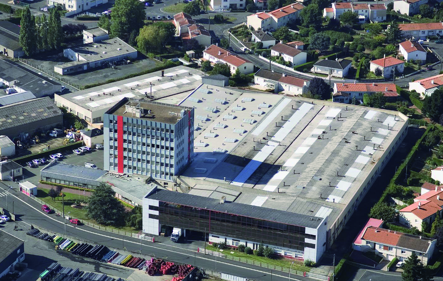 Site de l'usine et siège de l'entreprise Nicoll à Cholet.